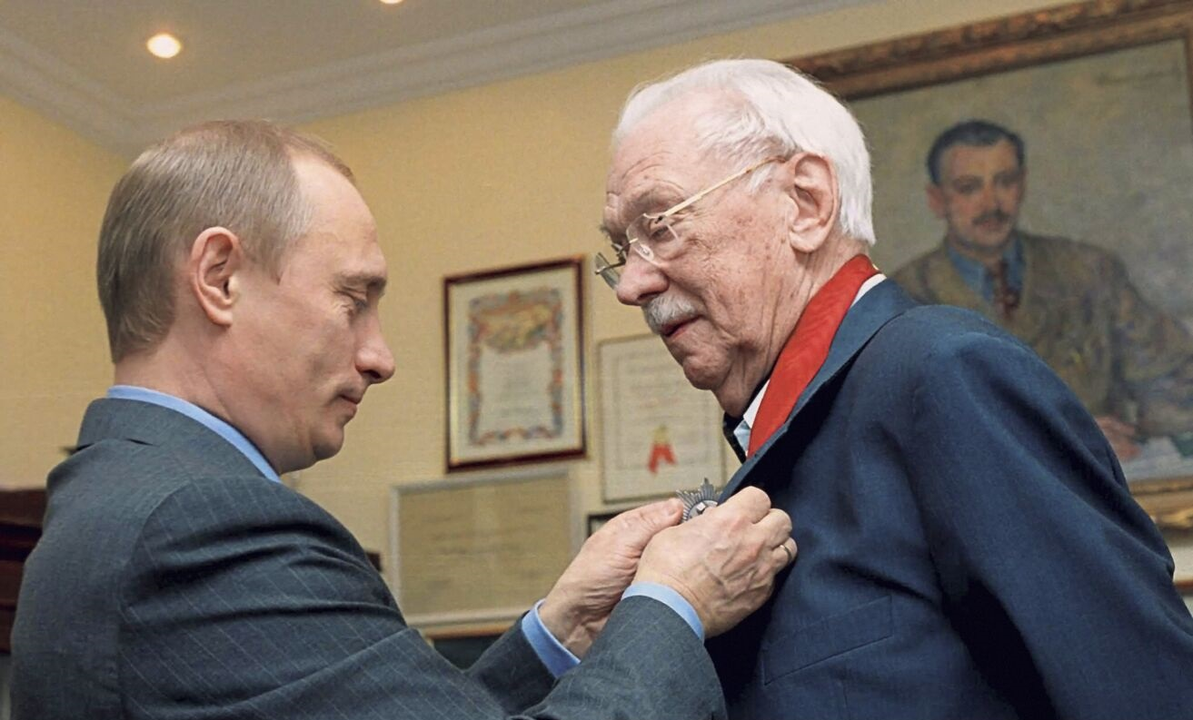 МОСКВА. Владимир Путин наградил Сергея Михалкова орденом «За заслуги перед Отечеством» II степени.